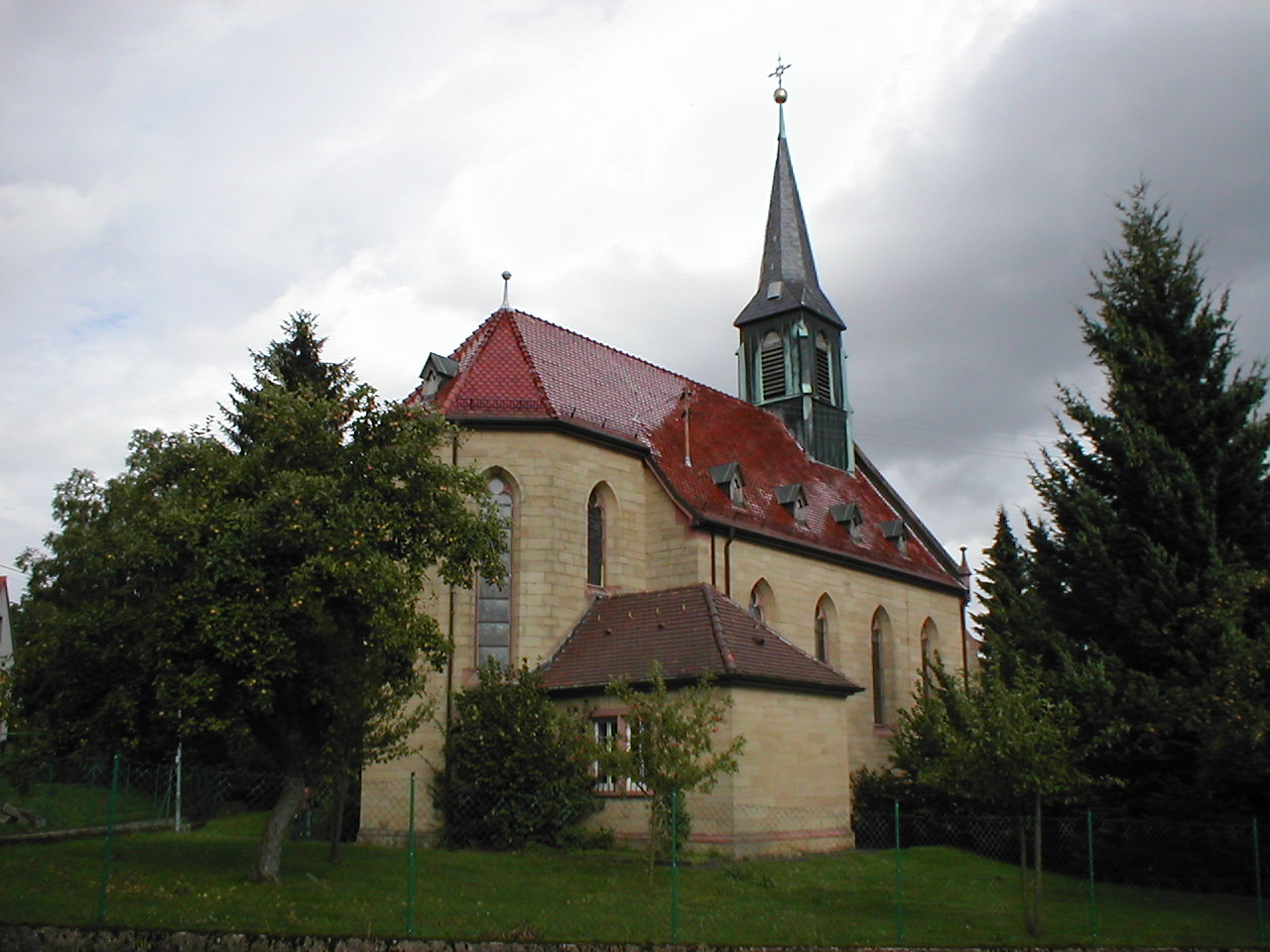 Katholische Kirche in Bargen, erbaut 1904